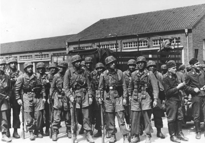 Heeresfilmstelle Bildarchiv Die Eroberer des Forts Eben Emael bei Lüttich, die gerade aus der Schlacht kommen. Es war eine ausgesuchte Abteilung der Luftwaffe die zuerst in das Fort eindrang. Die Aufnahme zeigt den Vortrupp in der Göring-Kaserne in Köln. Aufnahme am: 12.05.40 Ort: Belgien, Eben Emael bei Lüttich Aufnahme von: P.K. Bildberichter: Oblt. Büttner Negativ-Nr. P.K. 2/7